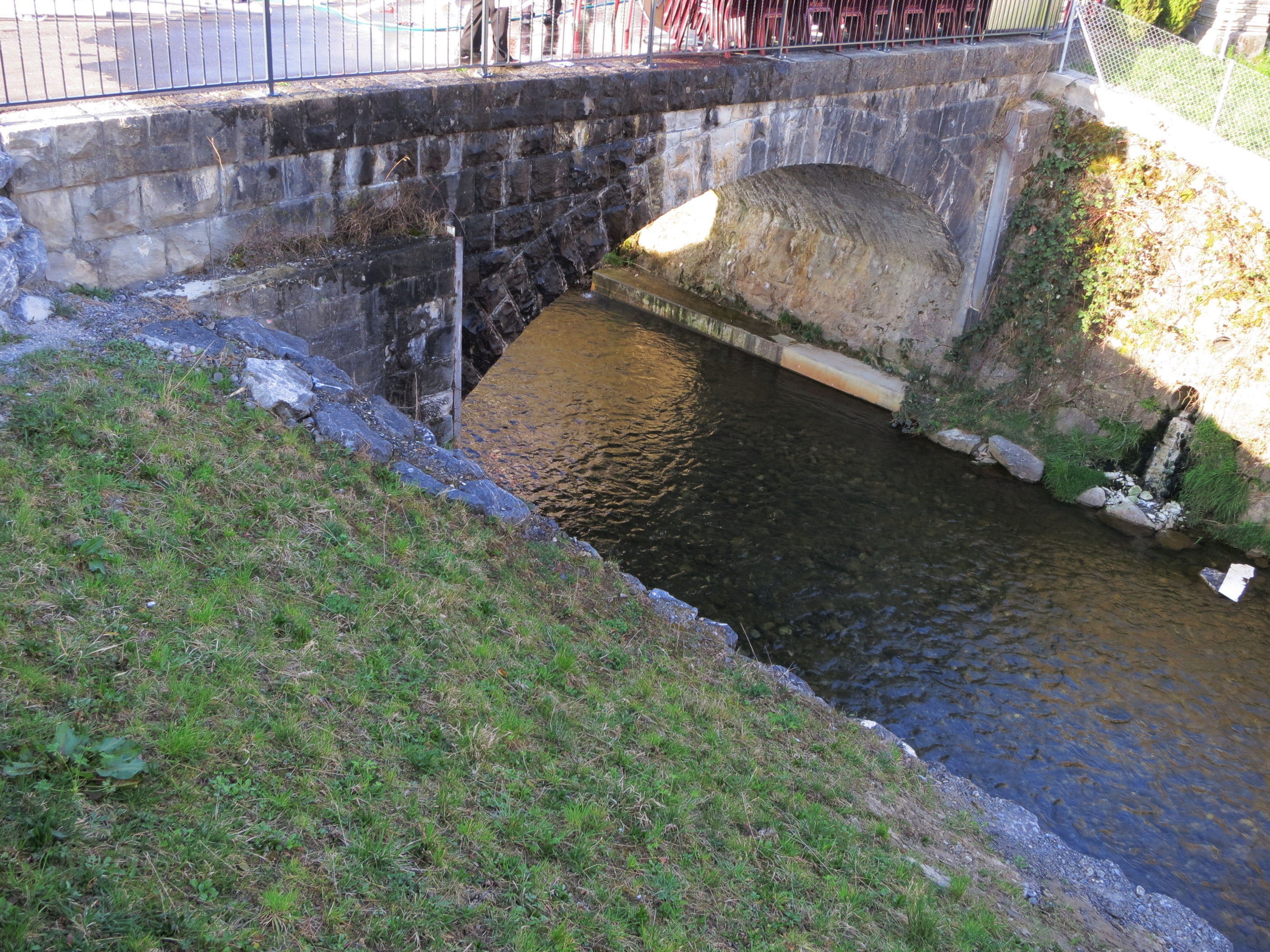 Hintergrabenbrücke, Giessen, Benken SG, Schweiz